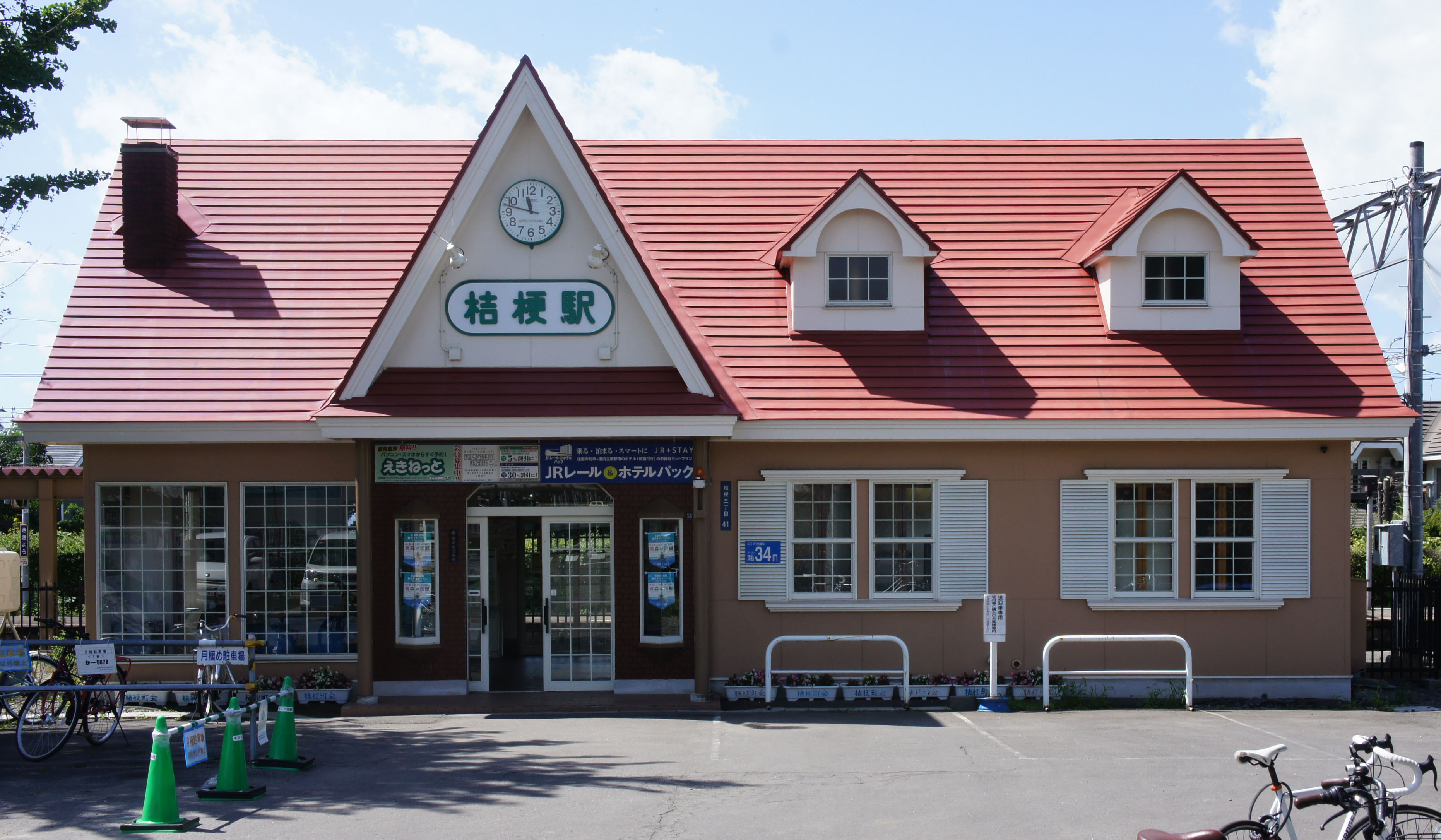 JR函館本線・桔梗駅の駅舎